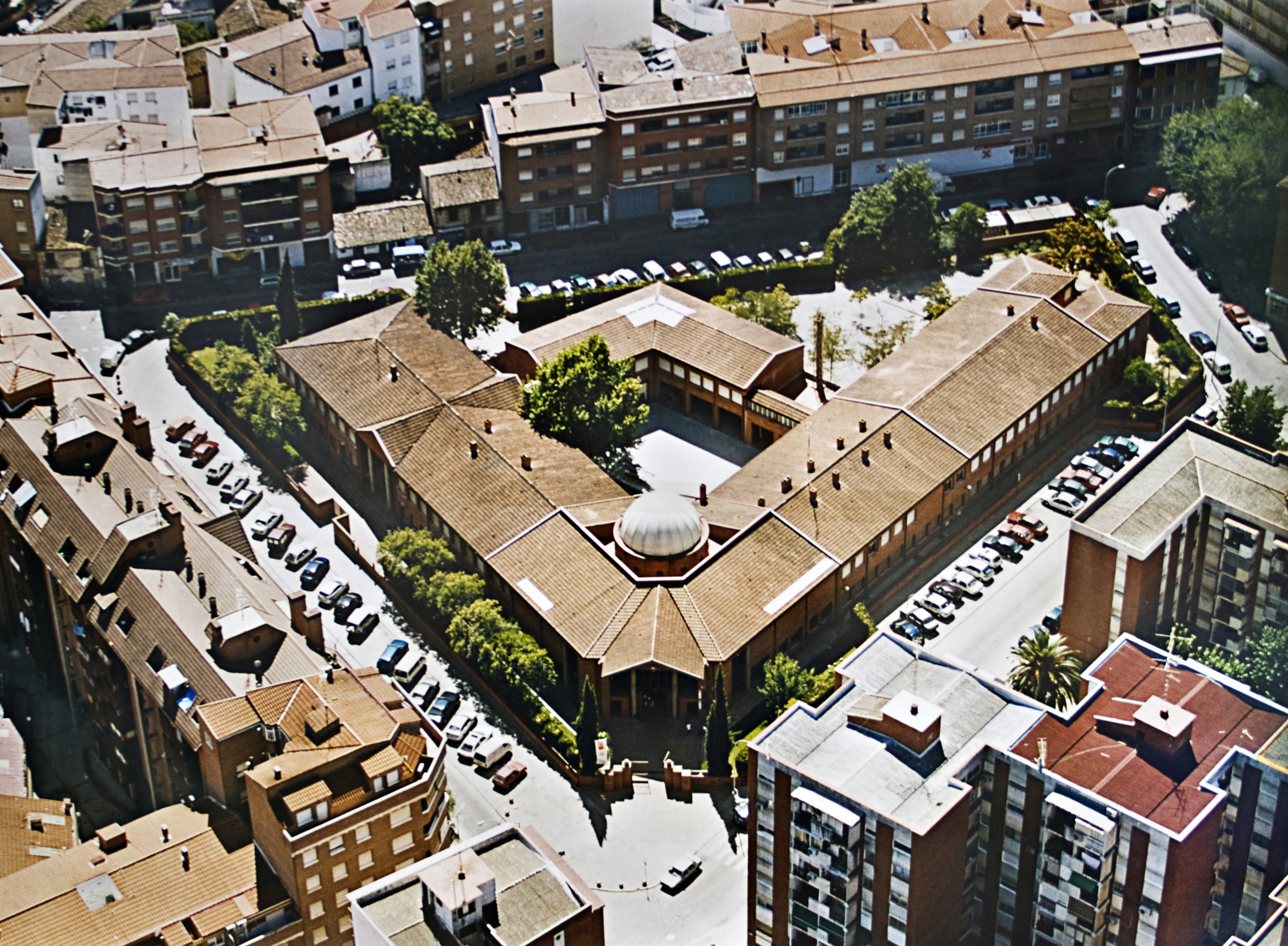 Vista aérea de la Escuela de Arte de Talavera de la Reina